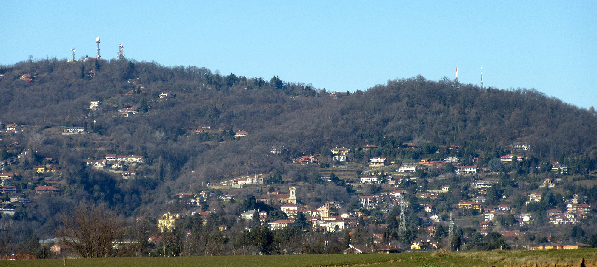 Collina Torinese. A destra il Bric della Croce (con le installazioni meteorologiche ben evidenti); al centro, la cittadina di Pecetto (TO); a destra, il Bric San Vito.